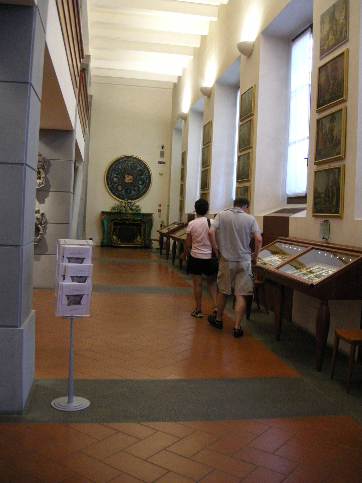 Opificio